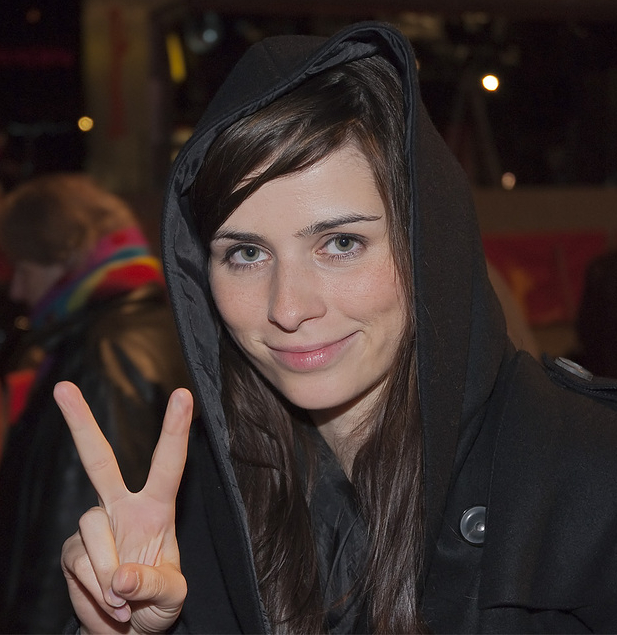 Nora Tschirner, German actress and TV presenter; Opening of the 59th Berlin International Film Festival